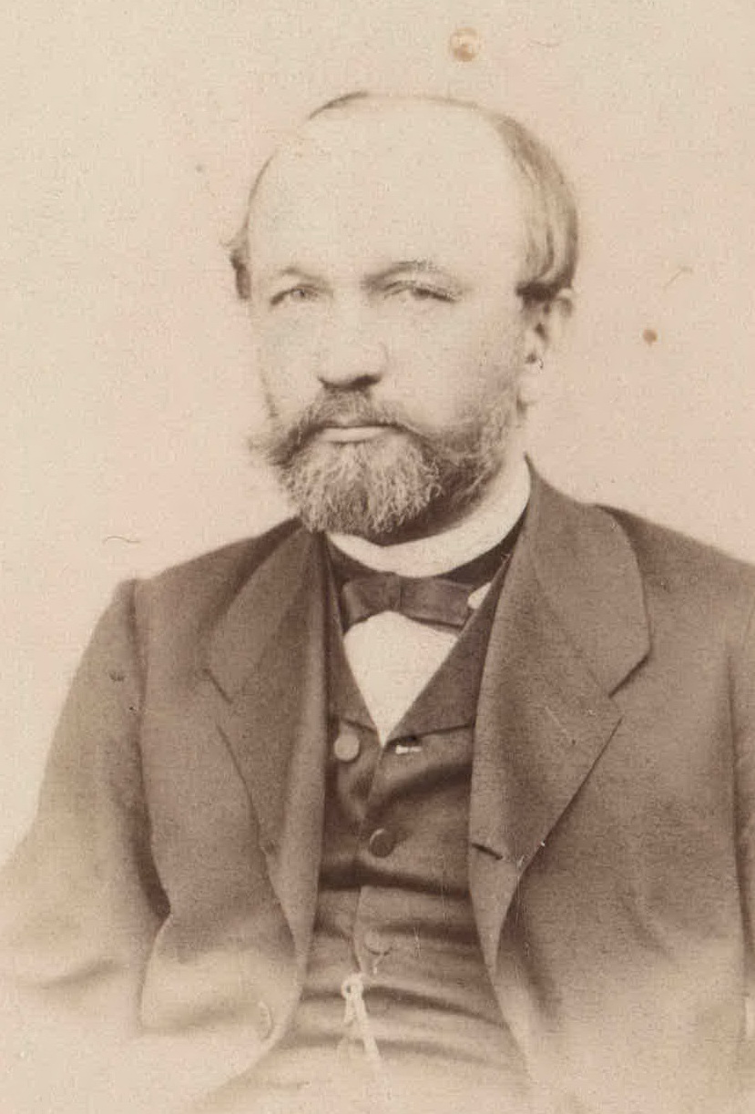 Николай Петрович Степанов